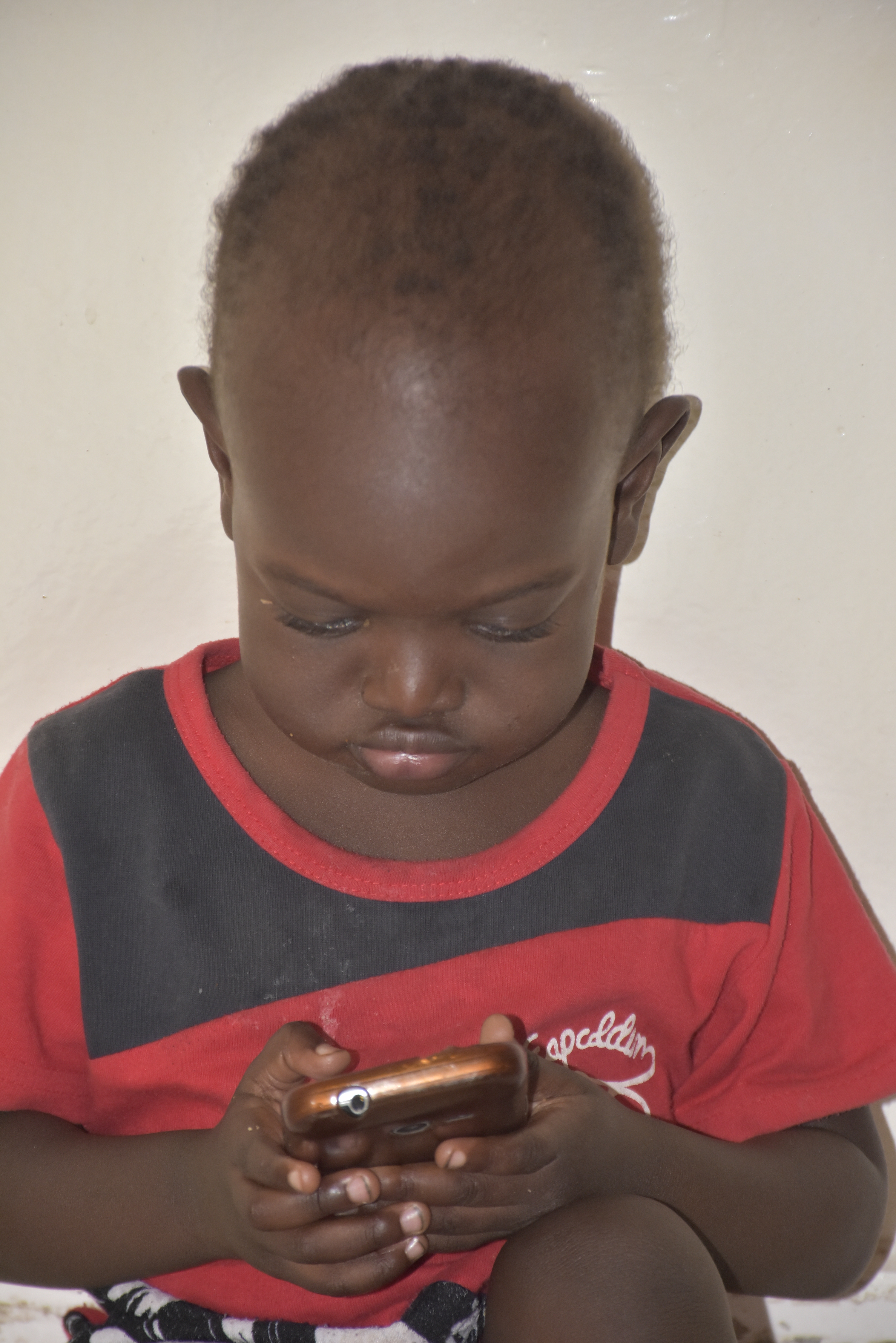 Avec la nouvelle technologie les enfants s'intéresse sur les jeux de portable